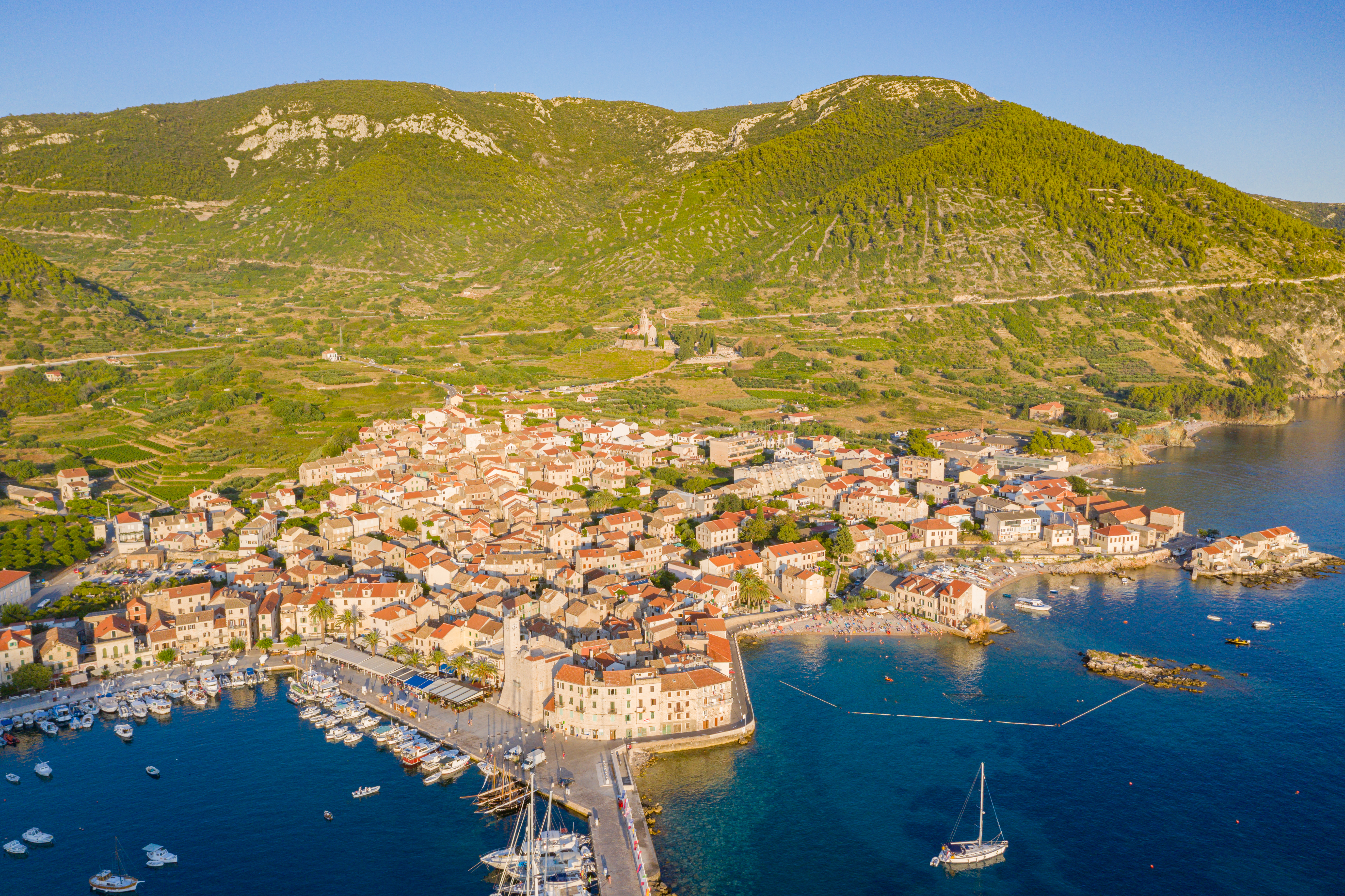 Croatia